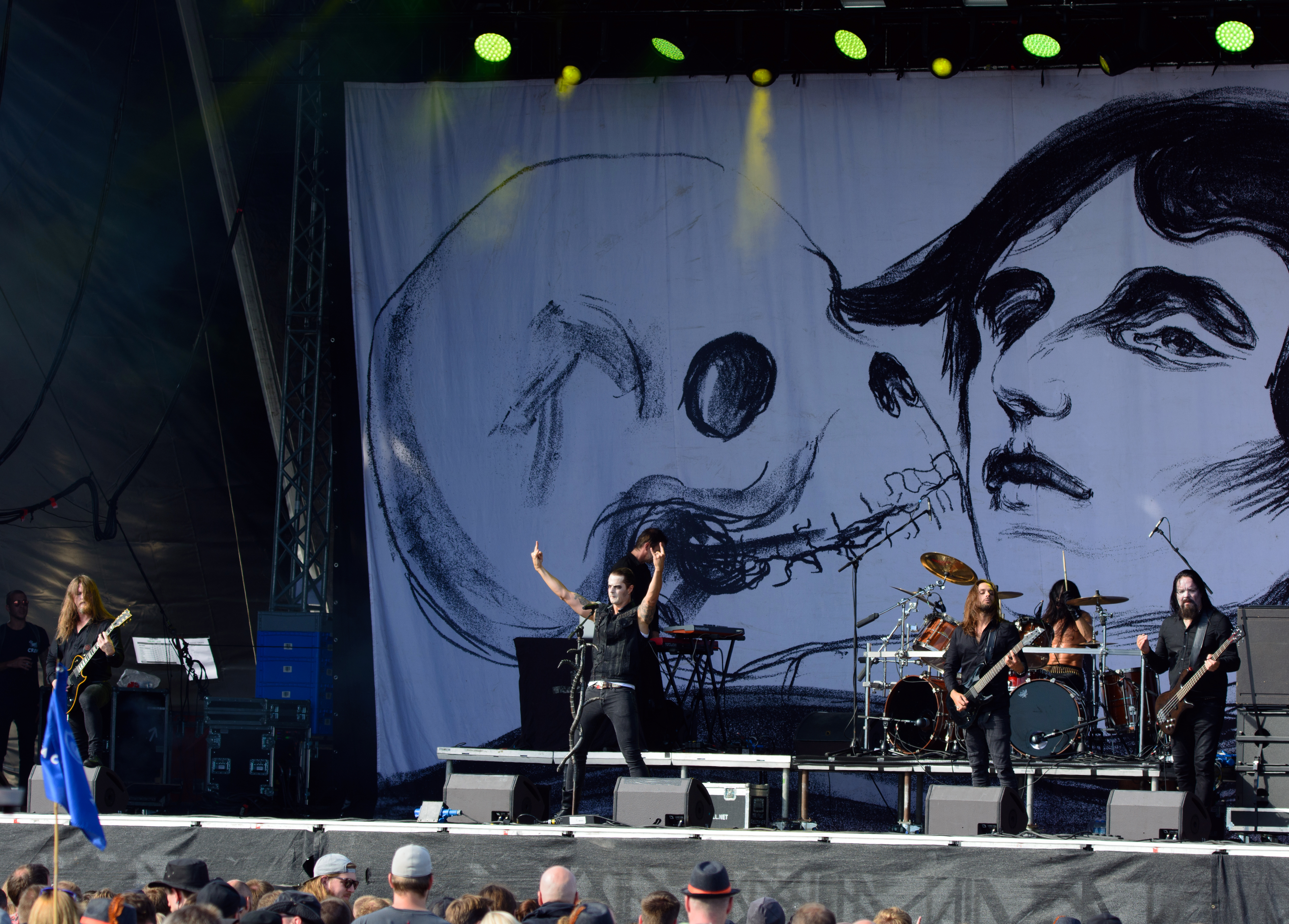 Satyricon beim Elbriot 2018